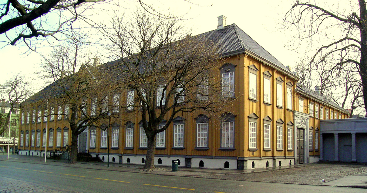 Stiftsgården, Trondheim. Fasade mot Munkegata.